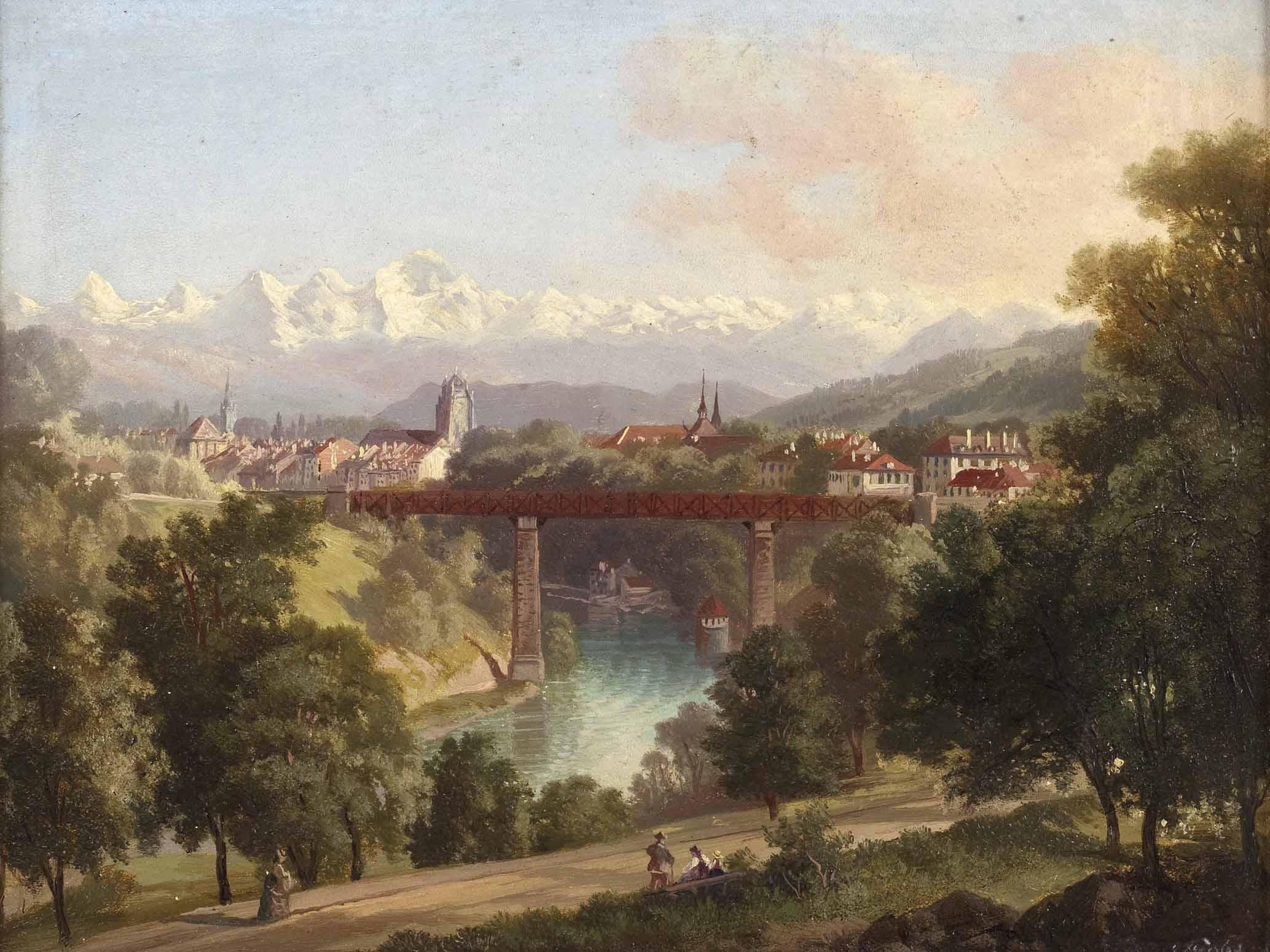 Ansicht der Stadt Bern vor Berner Oberland-Alpenkette mit der "Roten Brücke" über die Aare, unten rechts signiert: C. Fuchs, Öl auf Holz, 24,5 x 32 cm